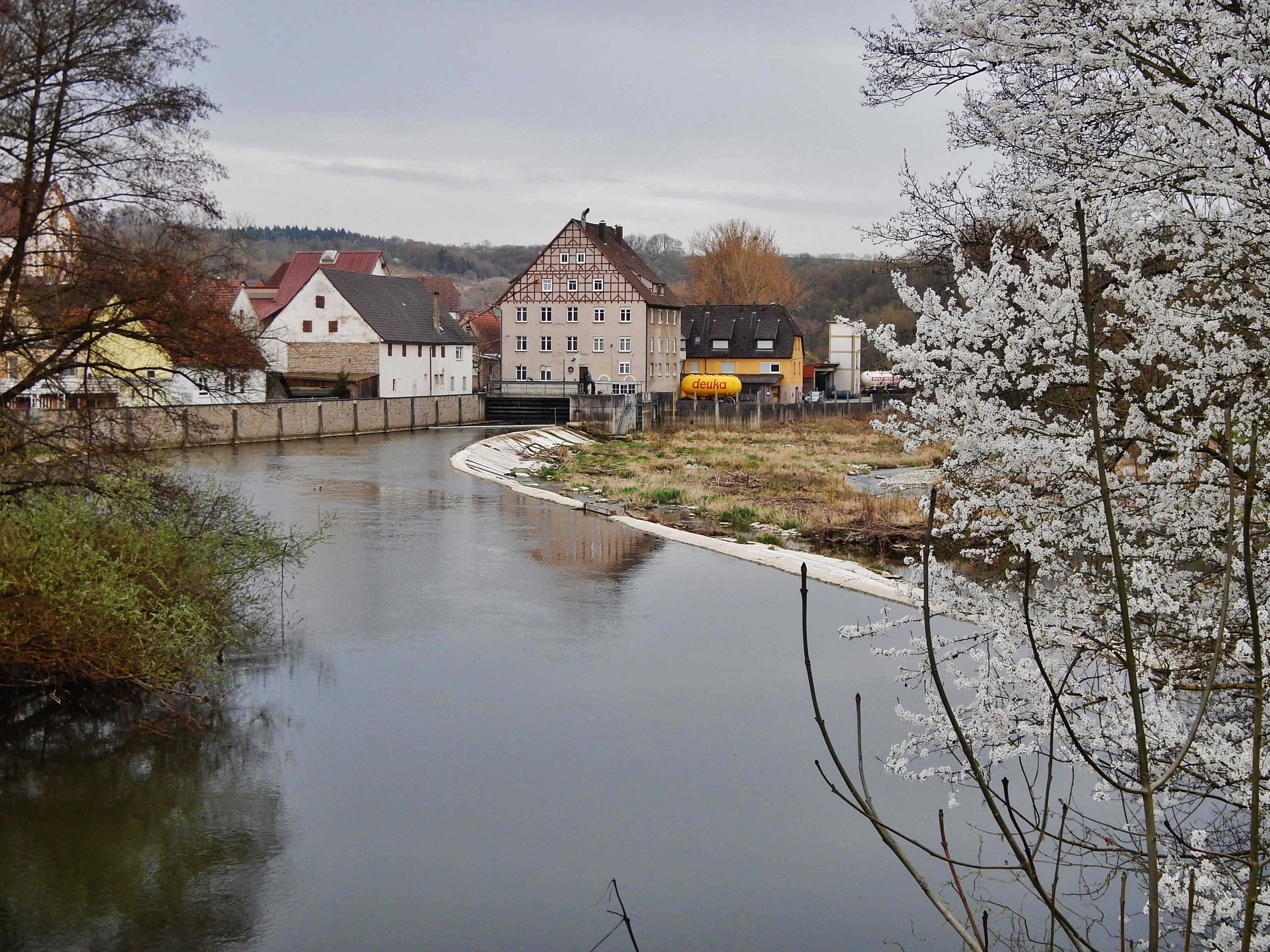 Jagst bei Schöntal